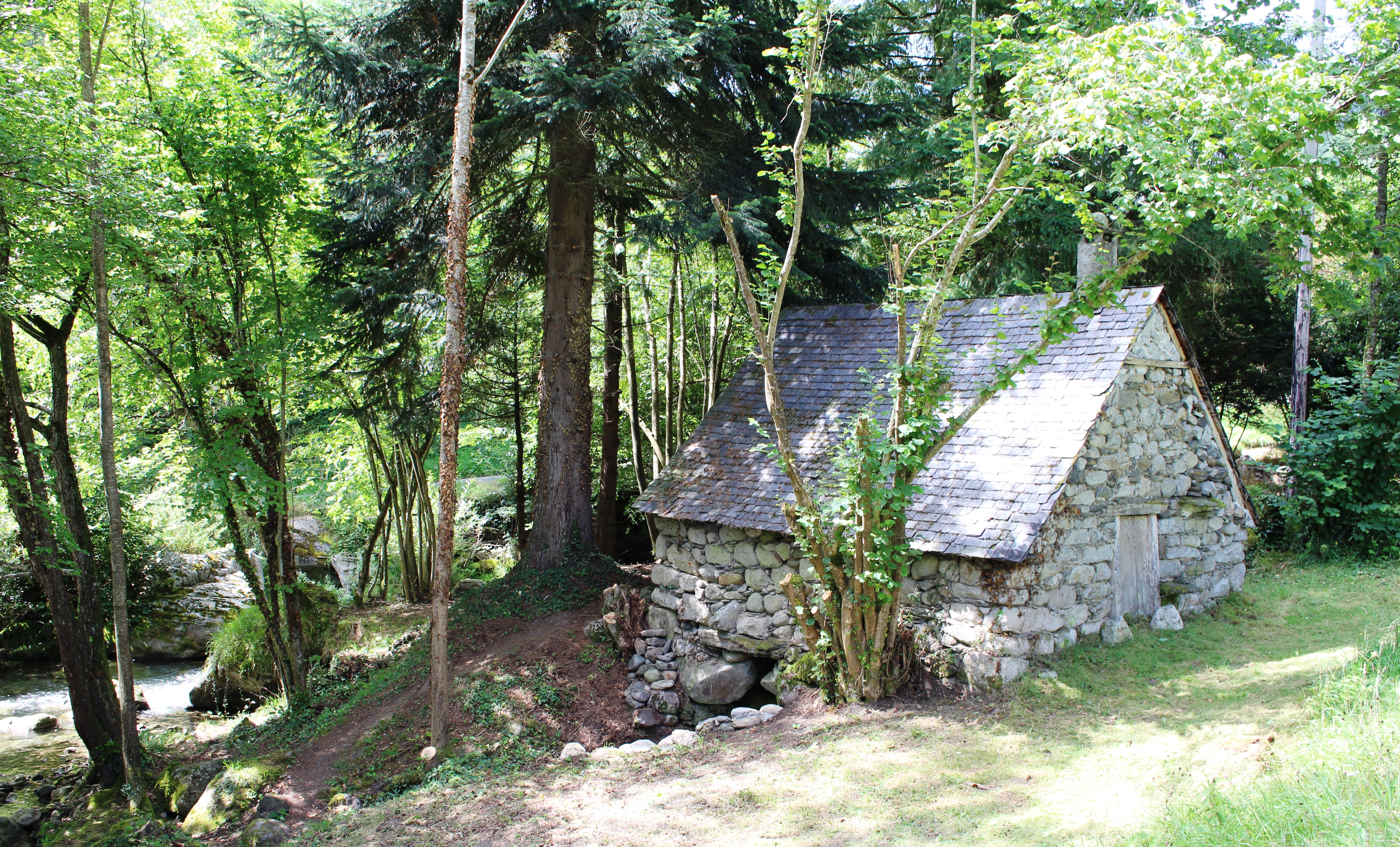 Moulin de Bun (Hautes-Pyrénées)